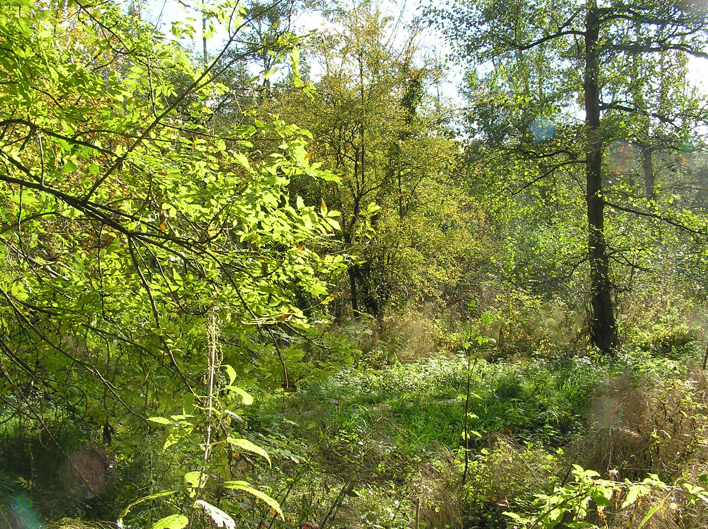 Jong Elzenbronbos in ontwikkeling. Reuzenpaardestaart is rechts duidelijk zichtbaar als dor element in de vegetatie.(Foto: B. de Rooy) Categorie:Afbeelding landschap